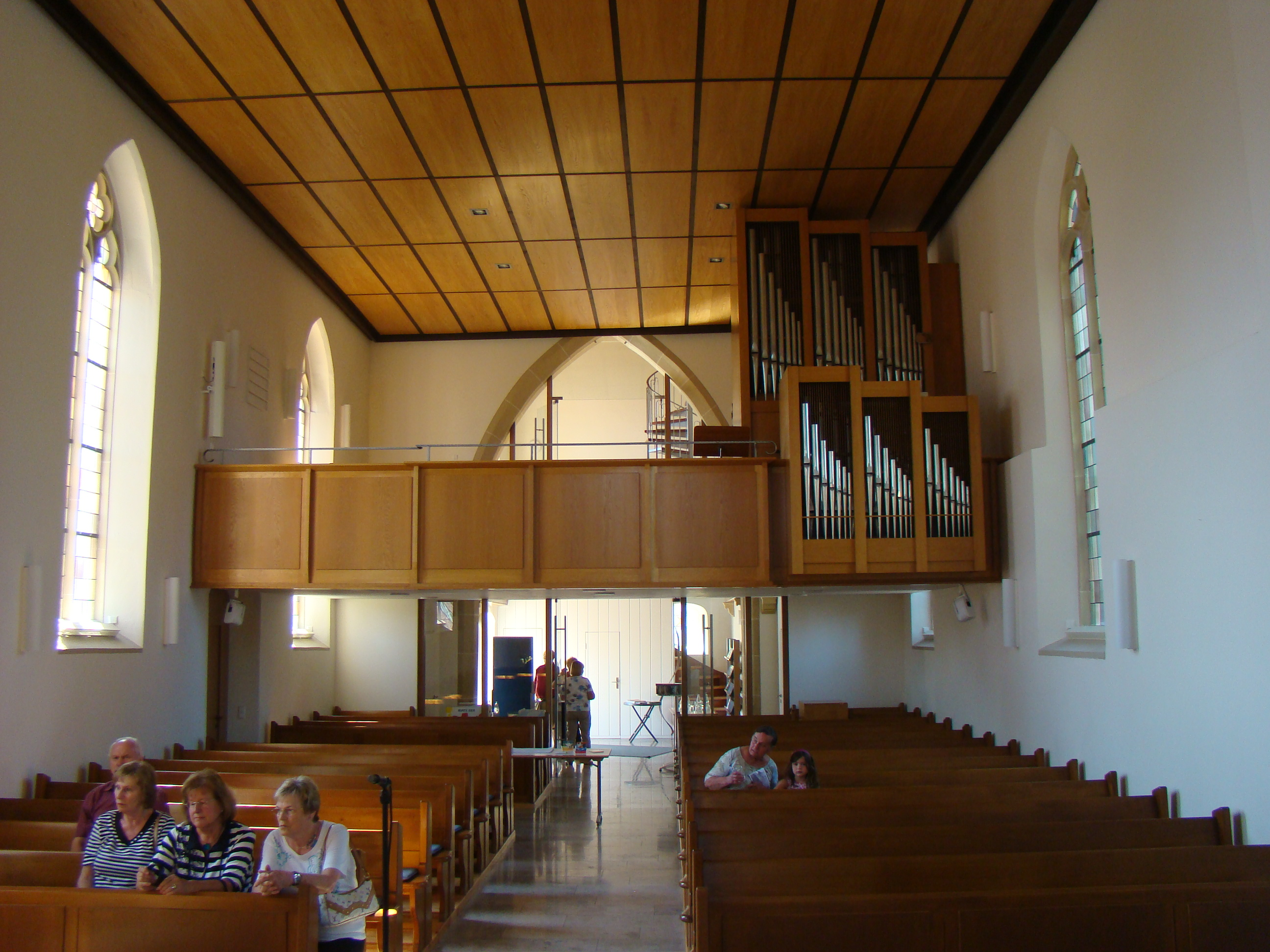 Albanskirche in Heilbronn-Frankenbach, Tag des offenen Denkmals 2012